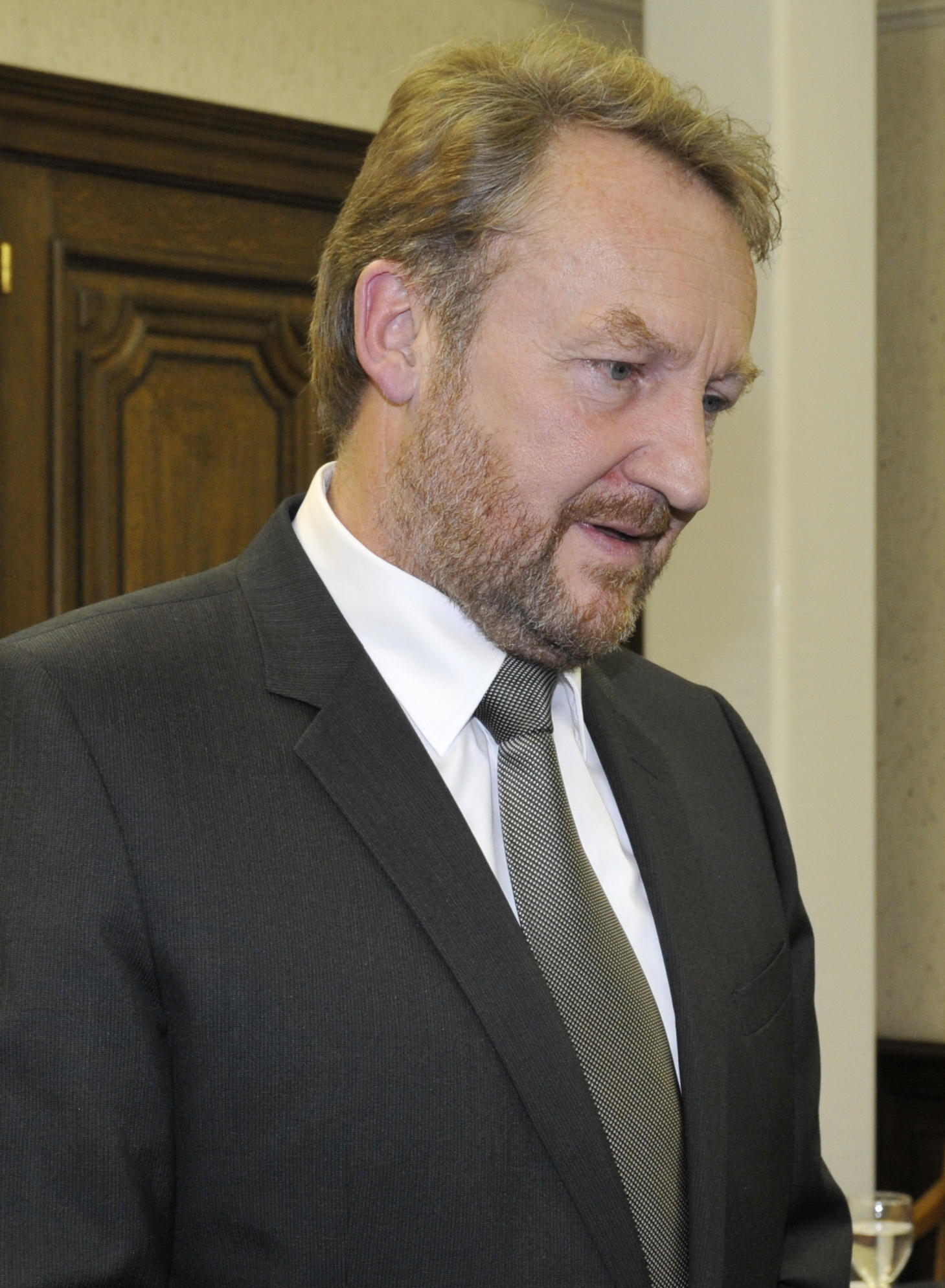 EPP Summit December 2010